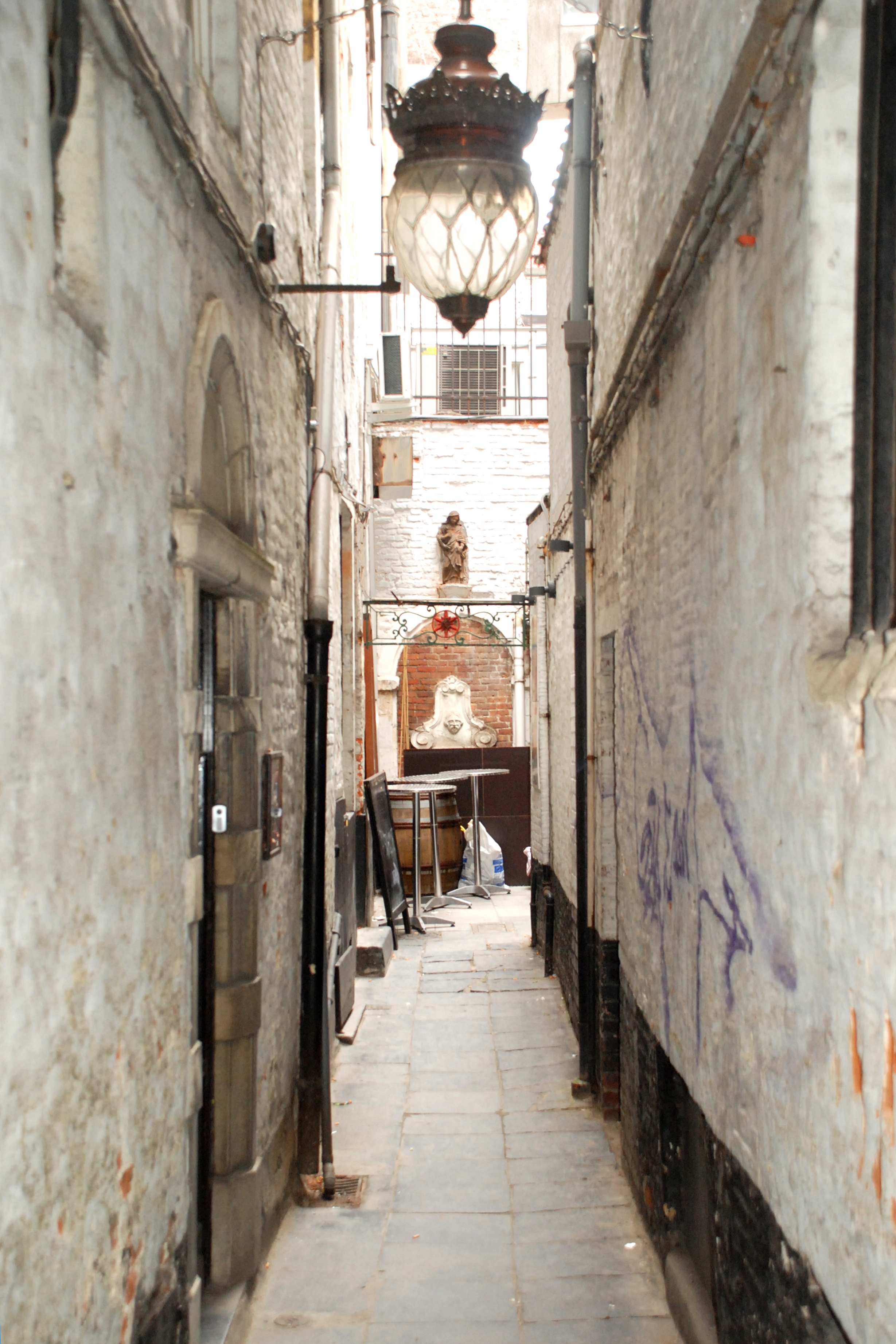 Belgique - Bruxelles - Impasse des Cadeaux